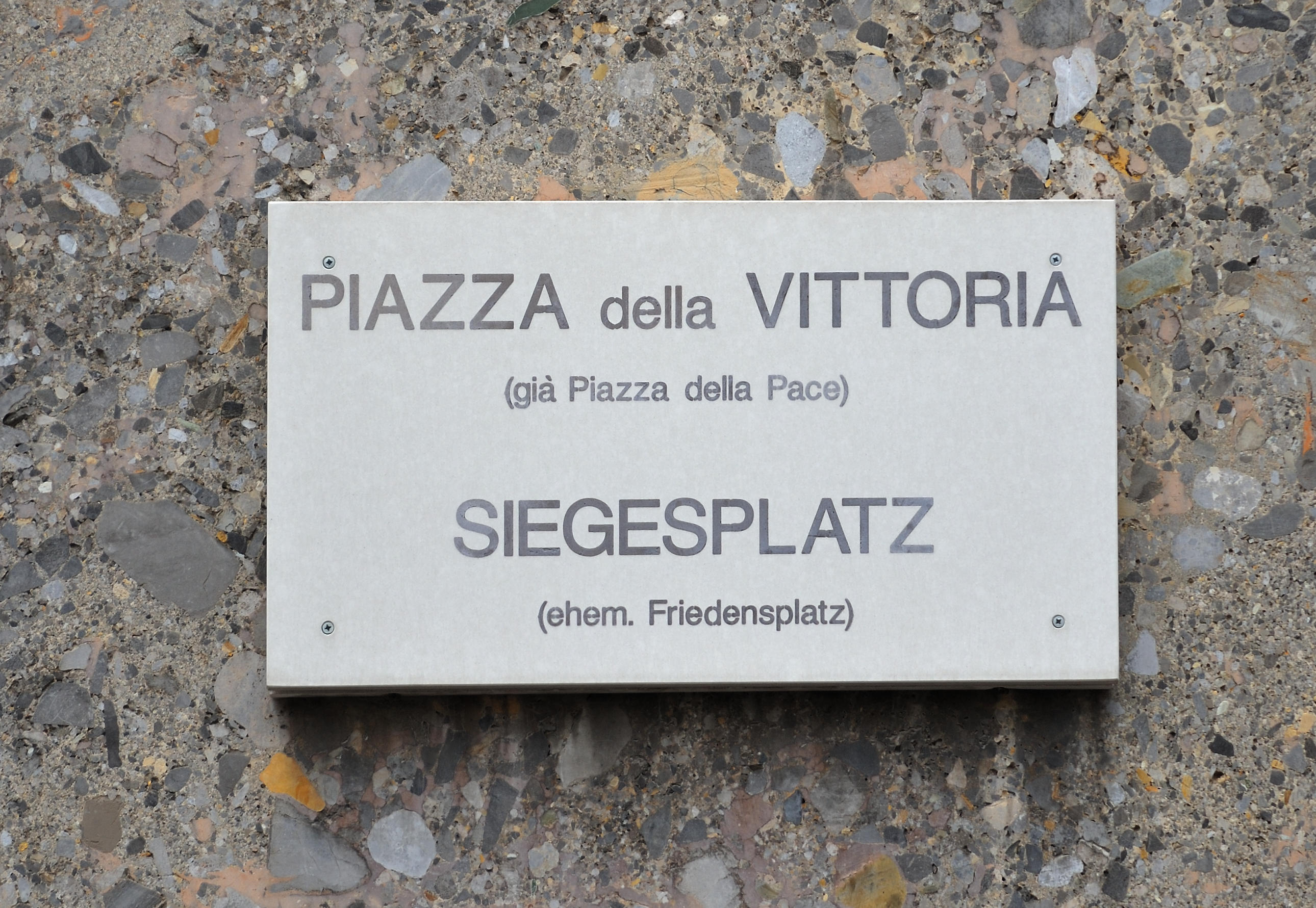 Strassenschild der Gemeinde Bozen am Siegesplatz (ehemaliger Friedensplatz)